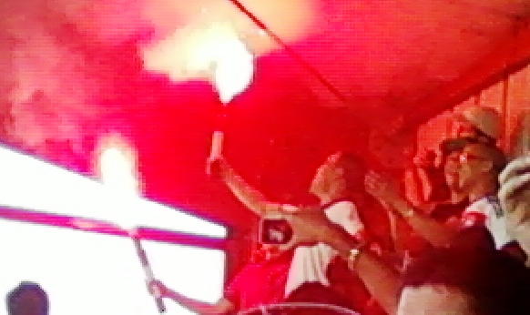 Ultras de l'USM Alger lors du match amical US Créteil - USM Alger du 16 août 2011